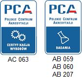 oznaczenia certyfikacji